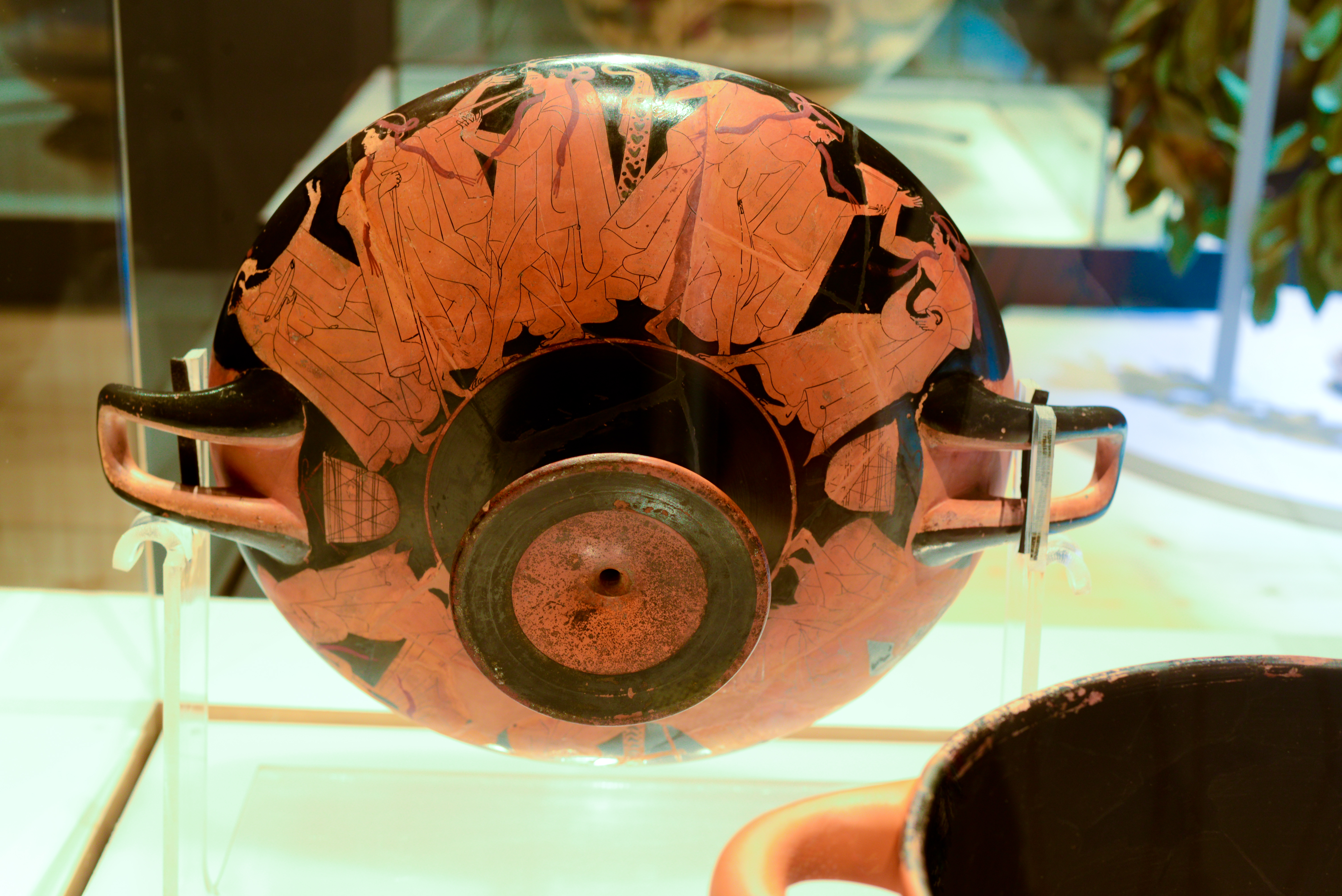 Coupe; inv 26126 et fragment Louvre Cp 11281. Rituels Grecs – Musée Saint-Raymond